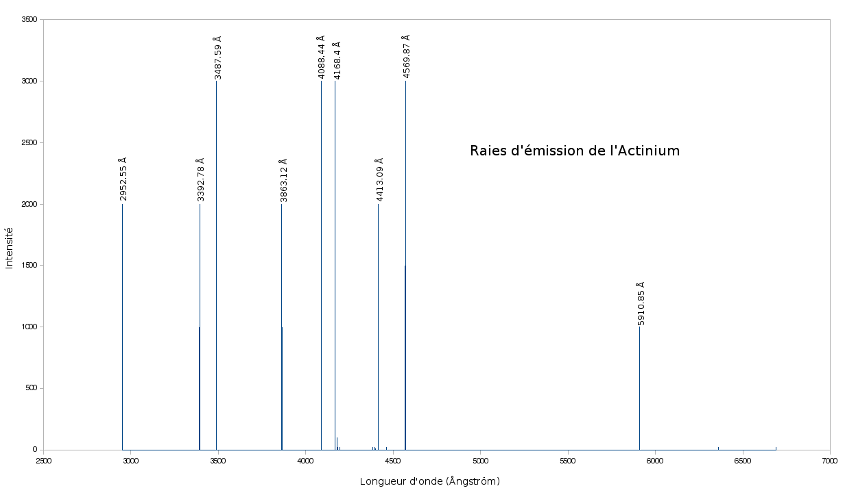 Raies d'émission de l'Actinium